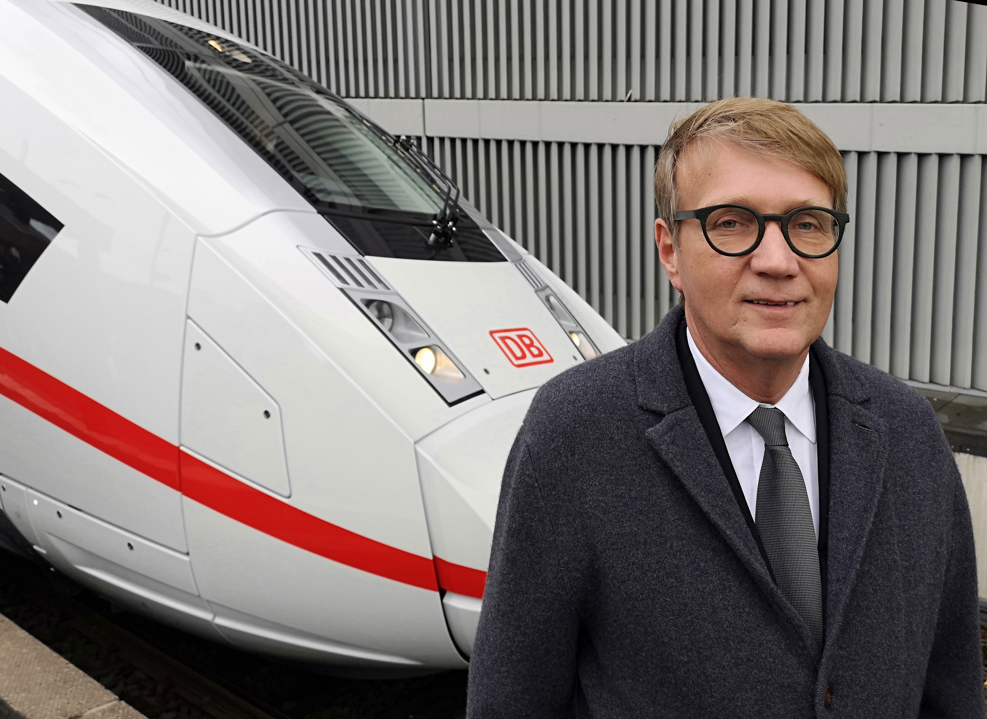 Ronald Pofalla (2018)